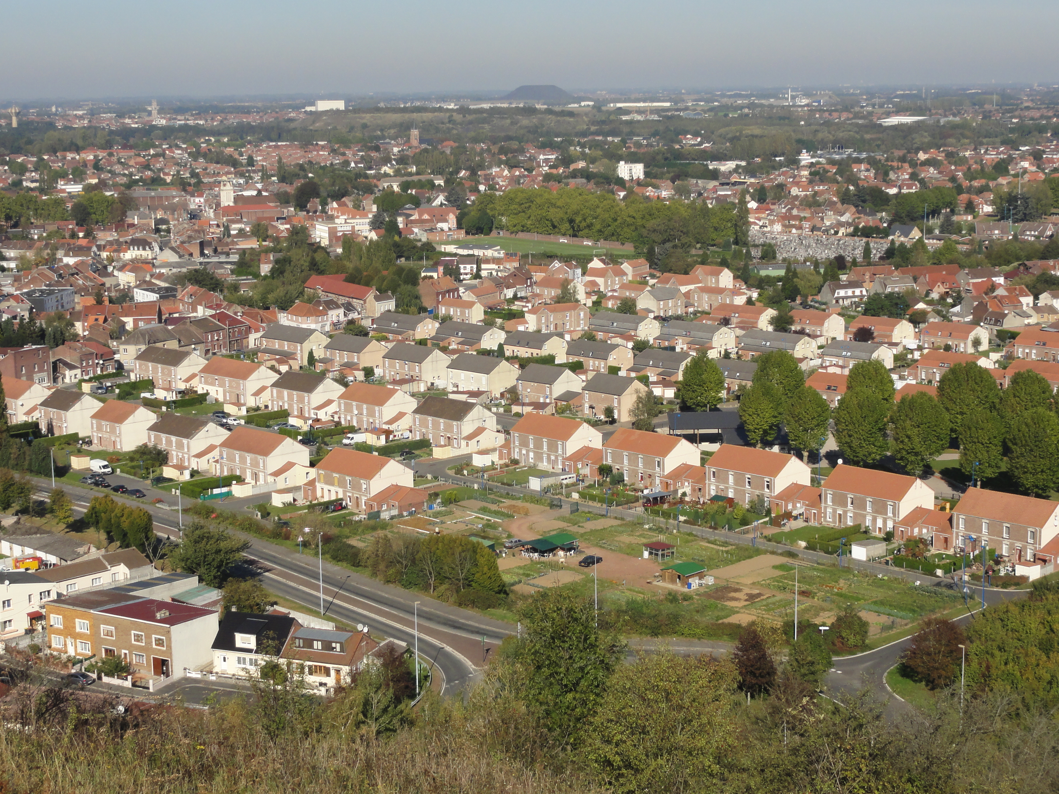 Cités de la Fosse n° 10 - 20 de la Compagnie des mines de Courrières, Billy-Montigny et Rouvroy, Pas-de-Calais, Nord-Pas-de-Calais, France.